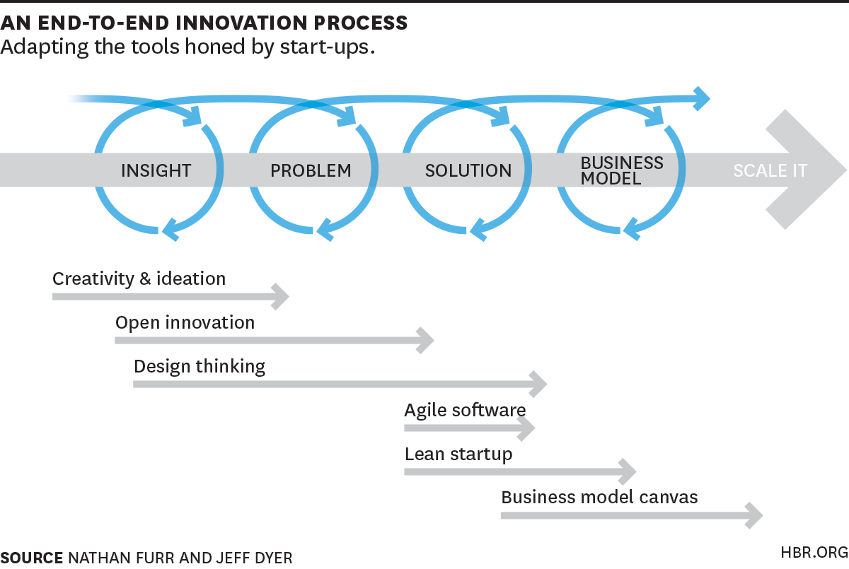 metode inovasi